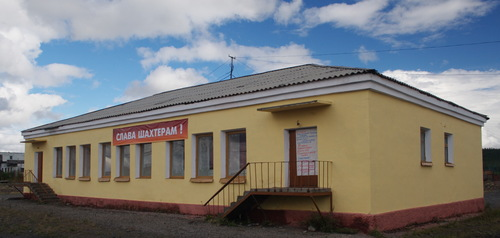 Дом культуры